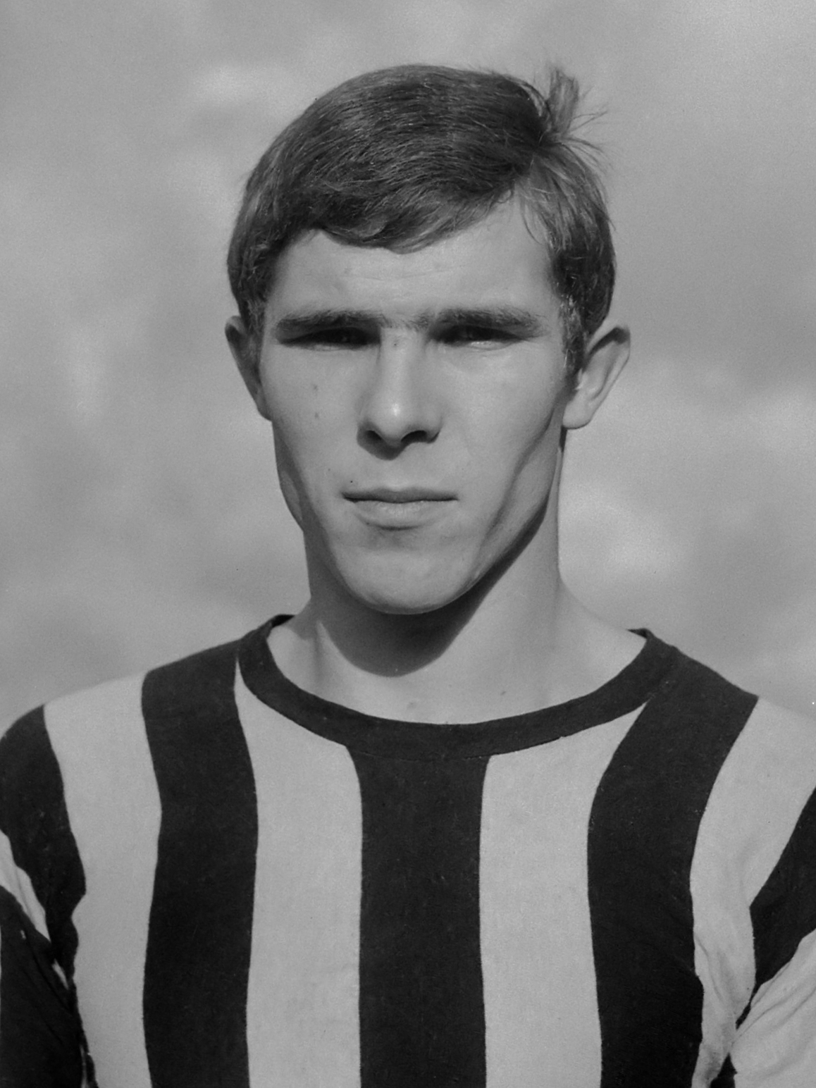 W. Hanegem (Velox) kop, rechtsbinnen 17 november 1964